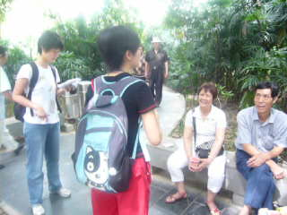 柳州高级中学2008年6月环保社活动 成员向路人介绍环保知识